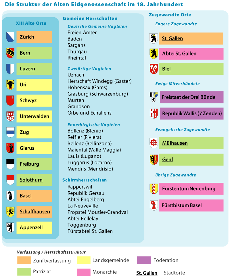 Die Struktur der Alten Eidgenossenschaft im 18. Jahrhundert